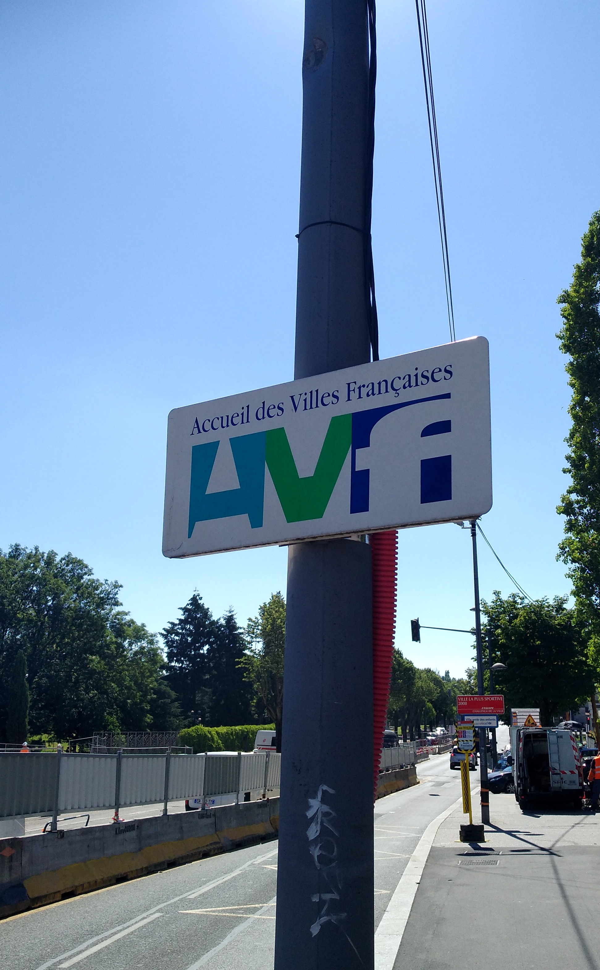 Panneau de l'Accueil des Villes Françaises (AVF) à Bron (Rhône, France).